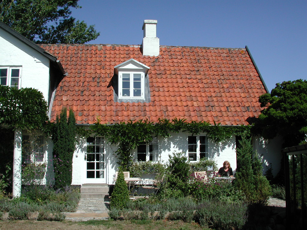 Falsled Kro, Fyn, Denmark